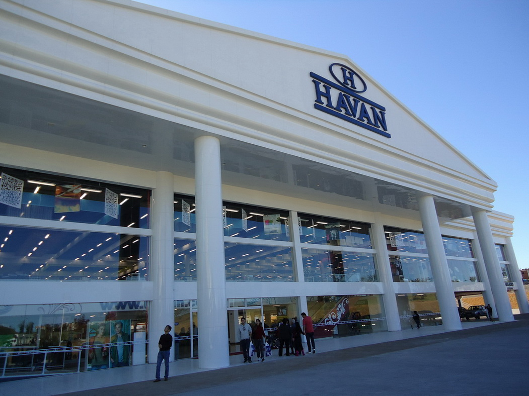 Imagem do município de Bauru, estado de São Paulo, Brasil.